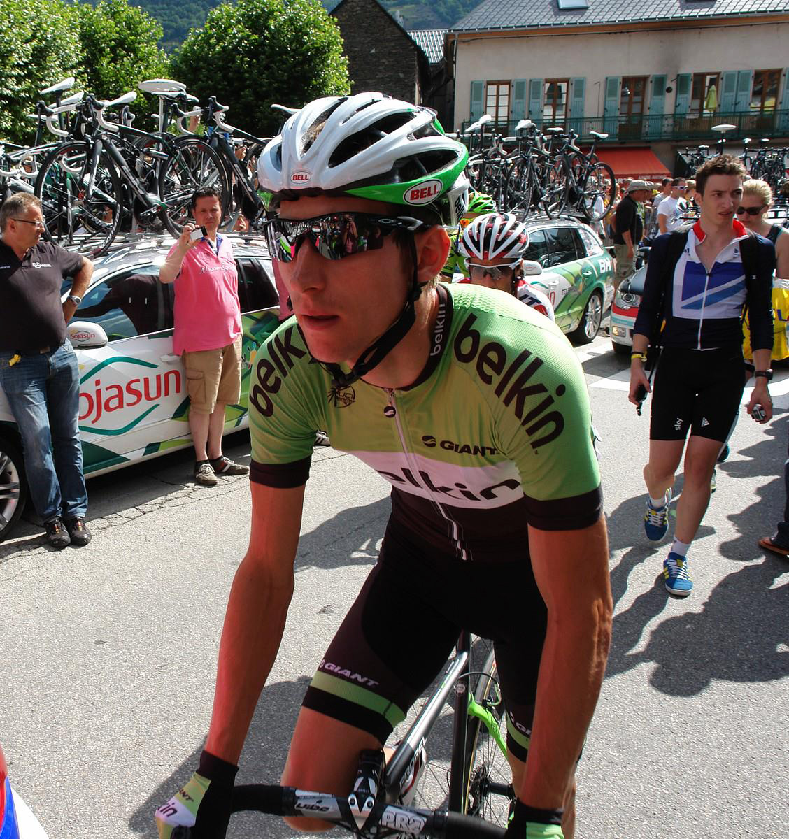 Bauke Mollema tijdens de start van de 19e Touretappe in Bourg d'Oisans, 19 juli 2013.